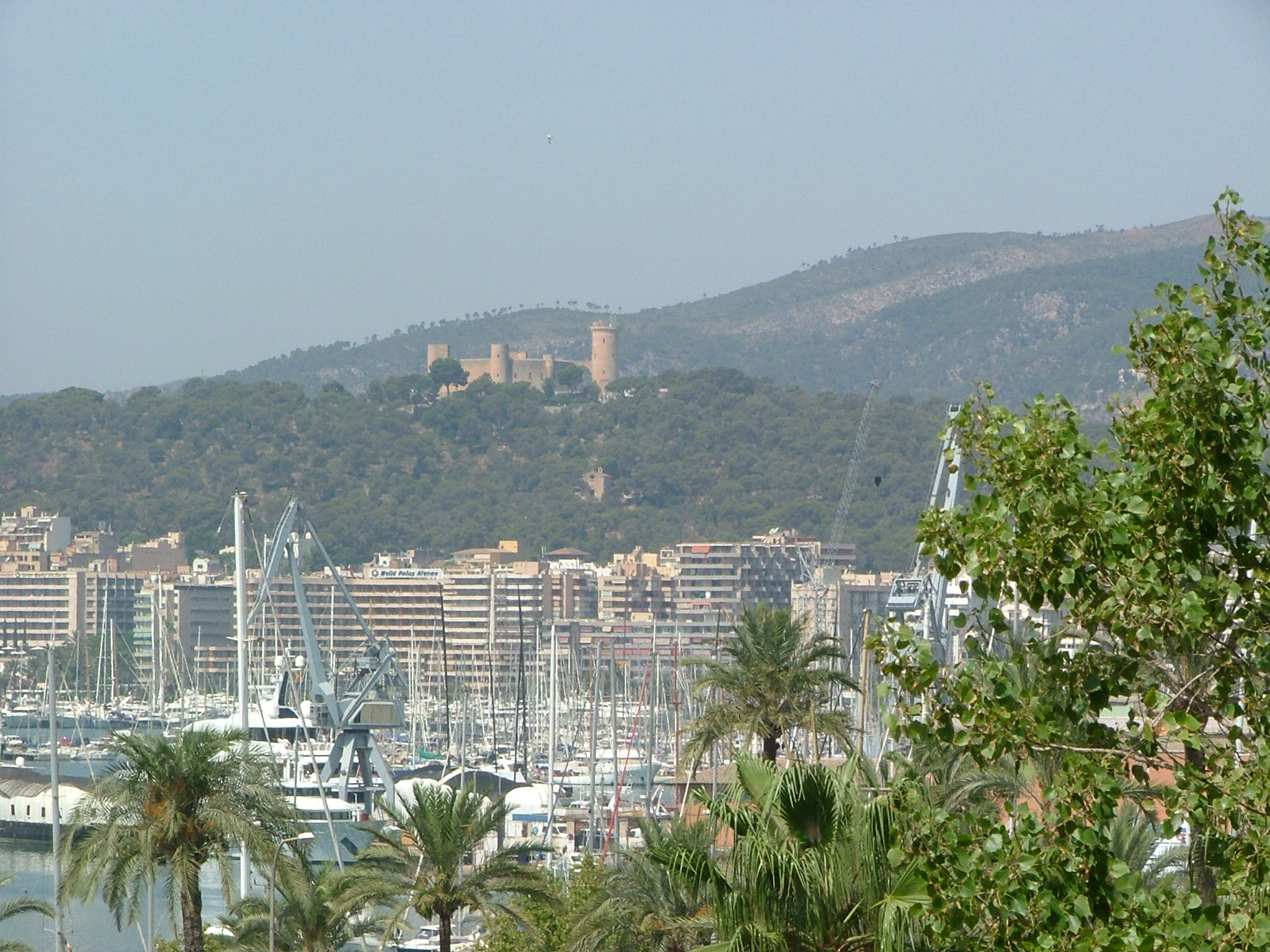 Castell Bellver Palma de Mallorca, Mallorca, Spain